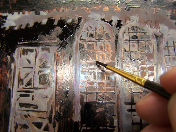 Aquatinta, Abdecken mit Asphaltlack